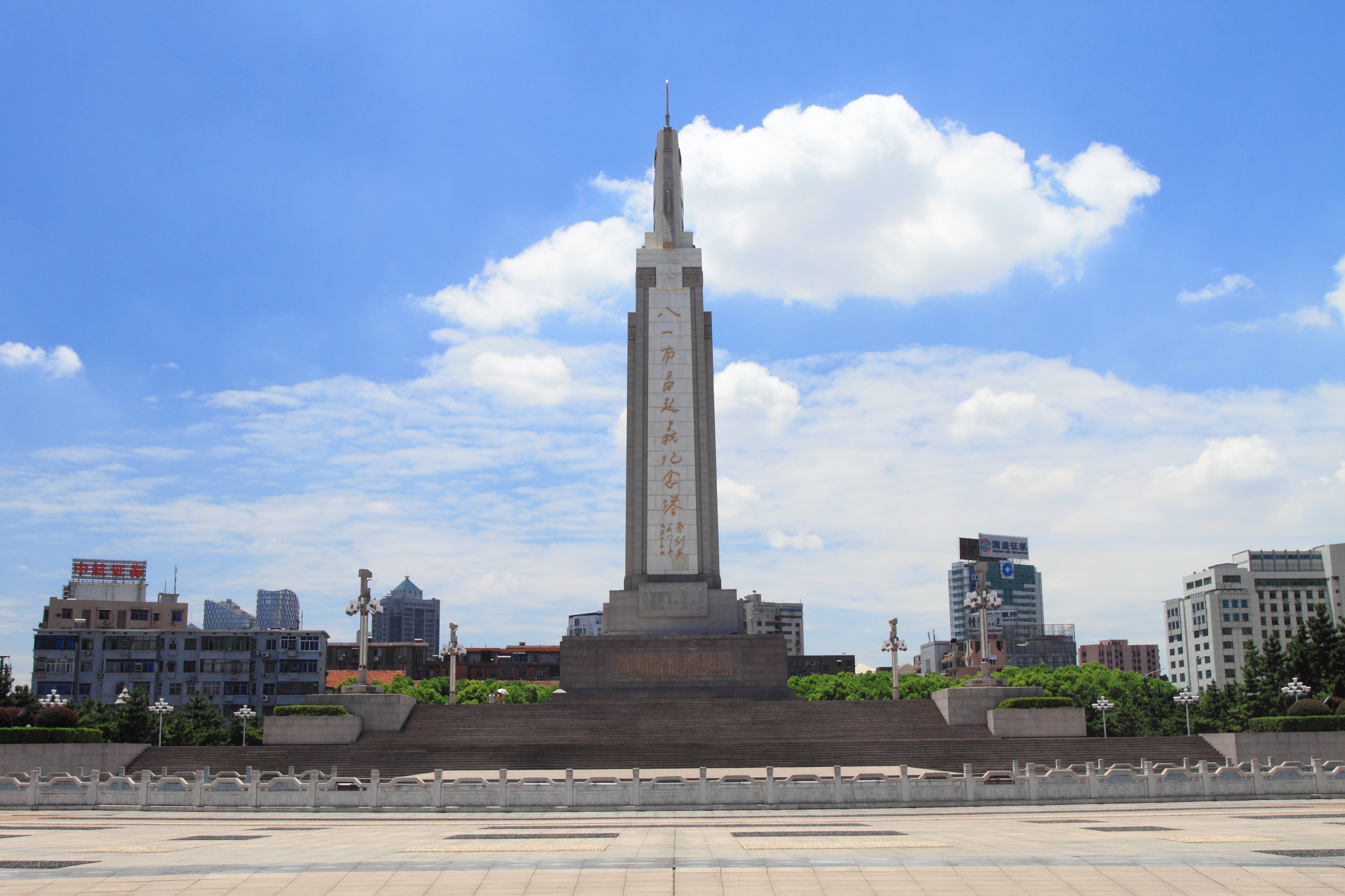 八一广场八一南昌起义纪念塔，位于中国江西省南昌市。